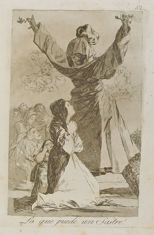 Capricho nº 52: ¡Lo que puede un sastre! de Goya, serie Los Caprichos